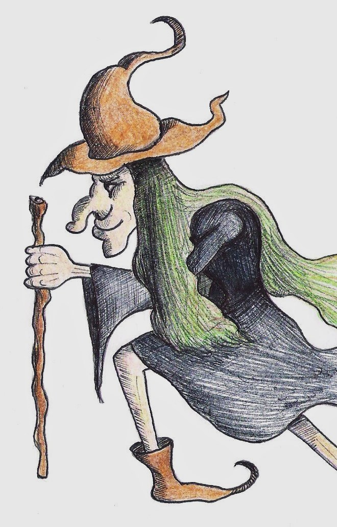 Krivapeta - matite colorate e penna su carta